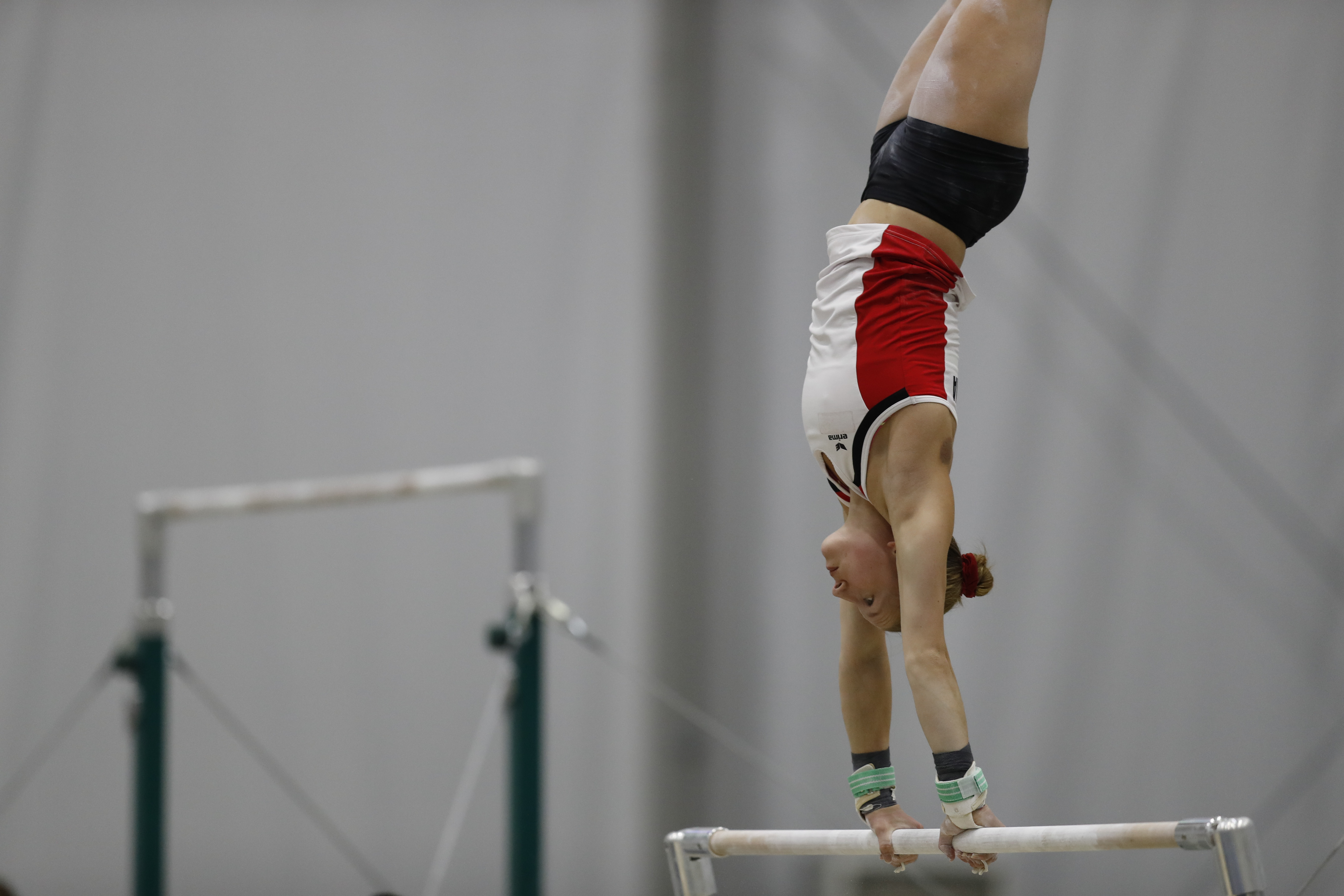 �Rio de Janeiro - Lisa Ecker, da ginástica artística da Áustria, treina no Parque dos Atletas para os Jogos Olímpicos Rio 2016 (Fernando Frazão/Agência Brasil)